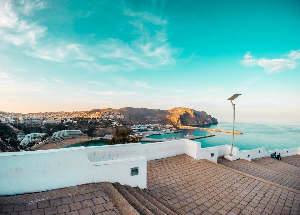 Morro viejo en Alhucemas